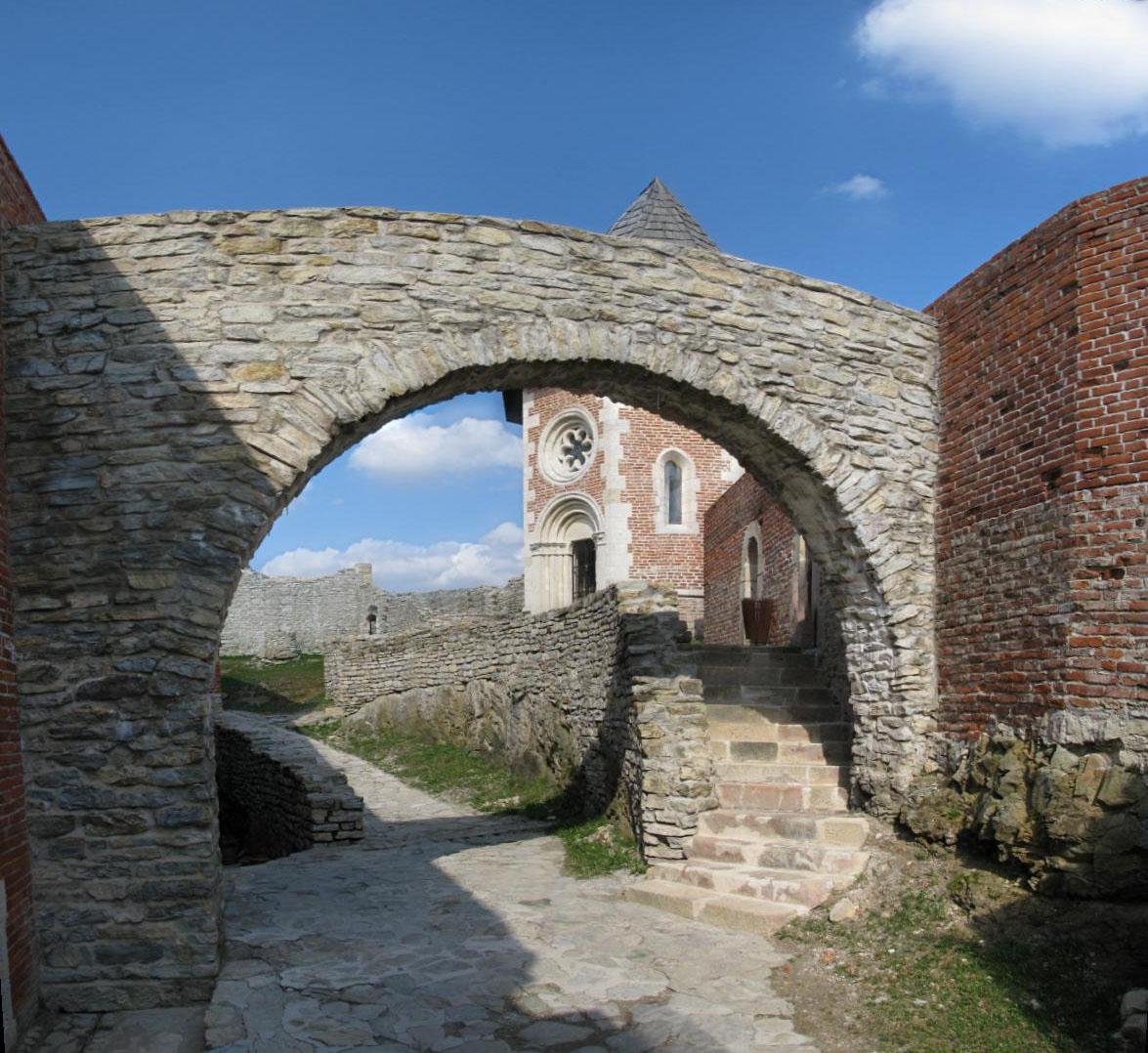 Medvedgrad, Zagreb